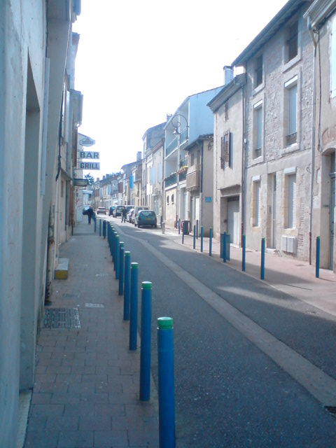 Rue Gambetta: ville du Passage d'Agen